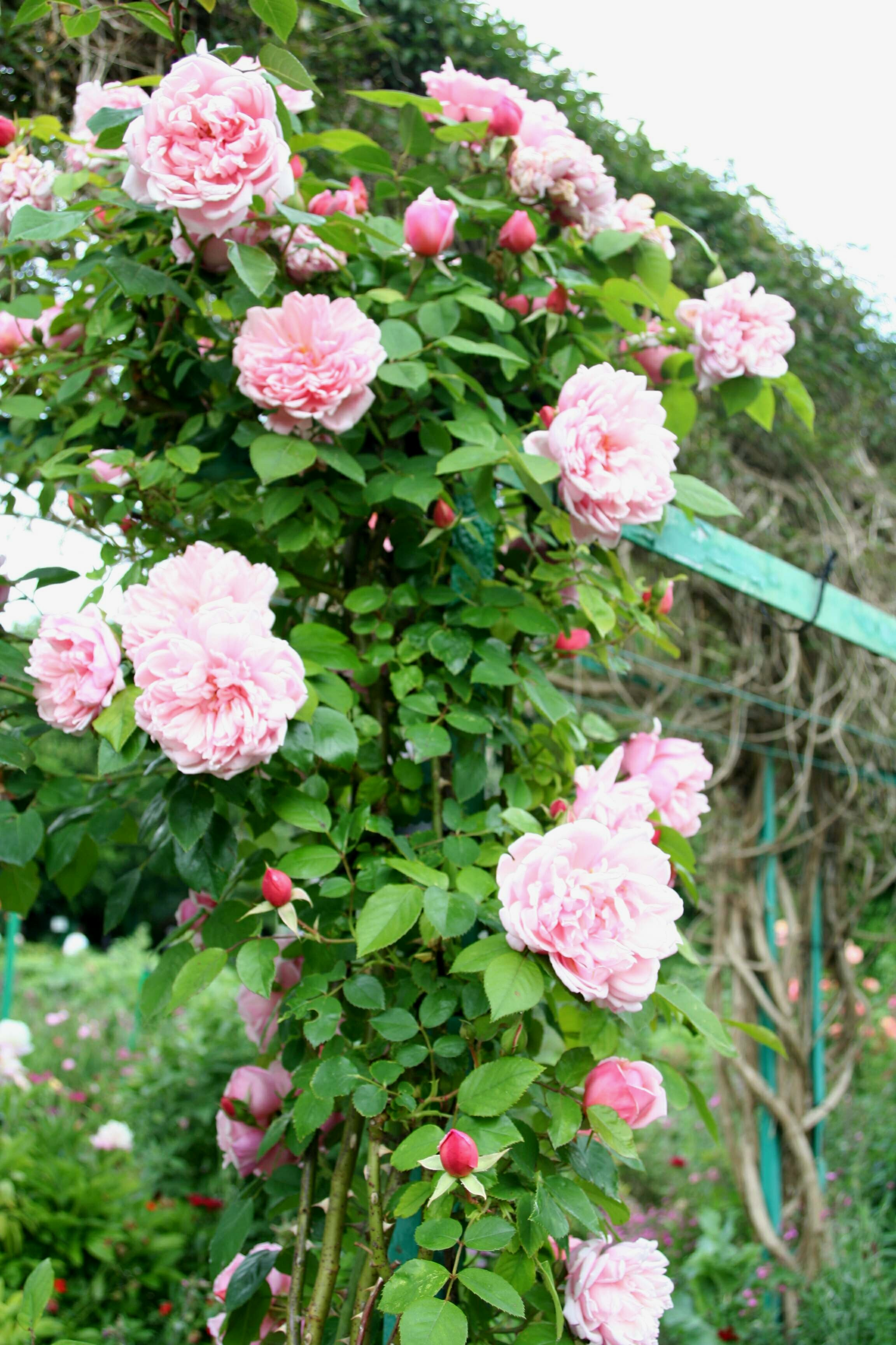 Rose 'Albertine' photographiée dans le jardin de Claude Monet à Giverny - Eure (France)